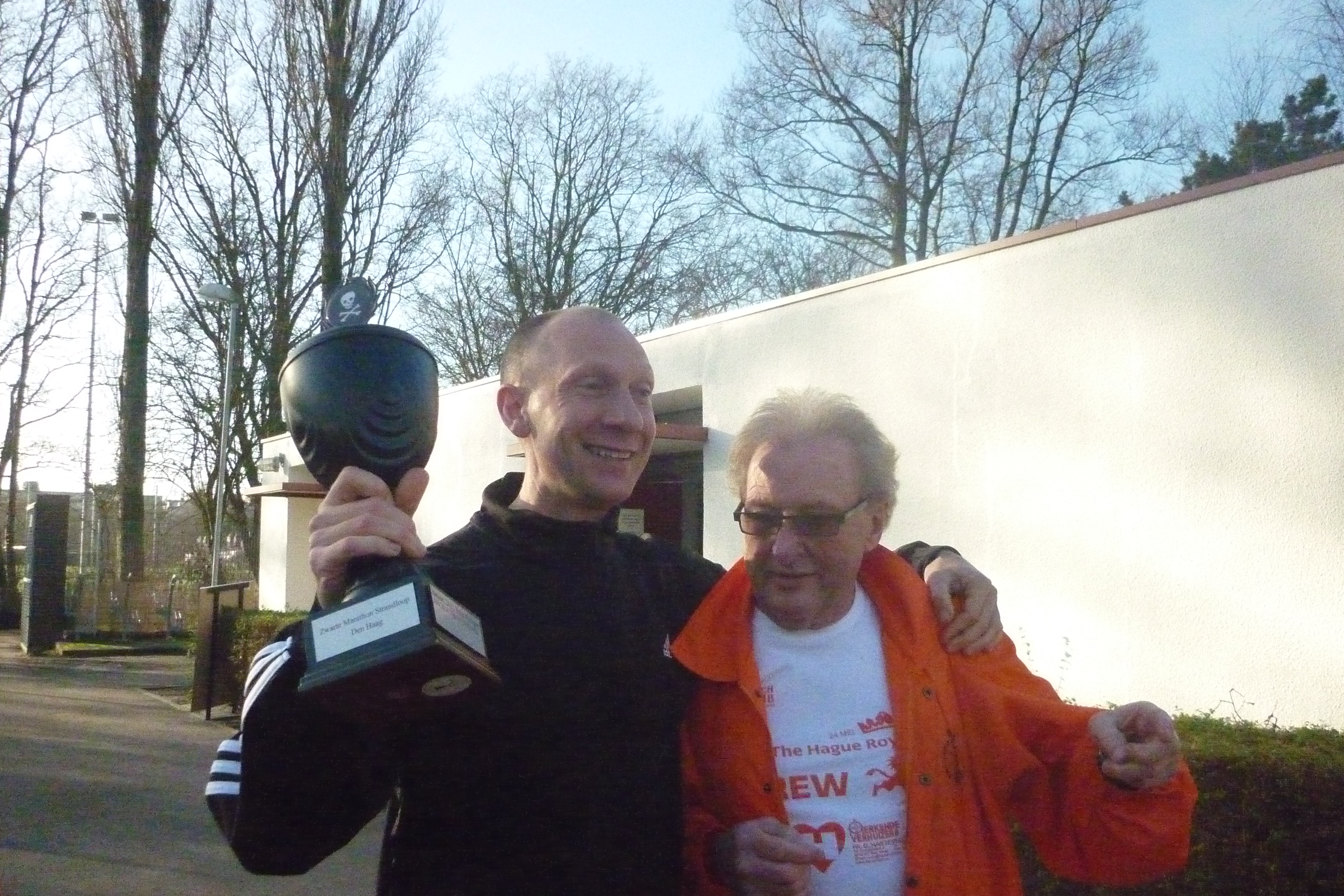 Andy Roodenburg uit Rotterdam, winnaar Haagse Strandmarathon januari 2012